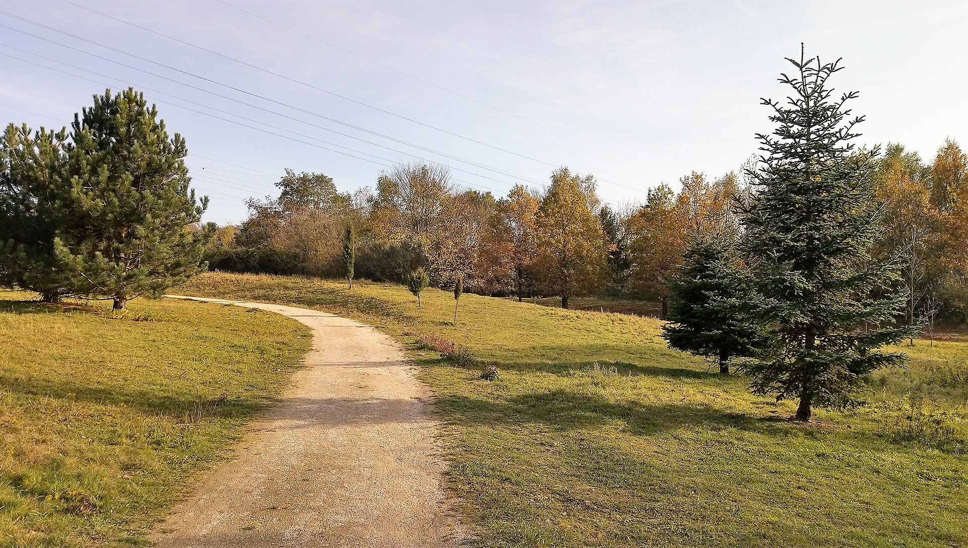 Luxembourg, au Parc Klosegrënnchen de l'Arboretum Kirchberg.